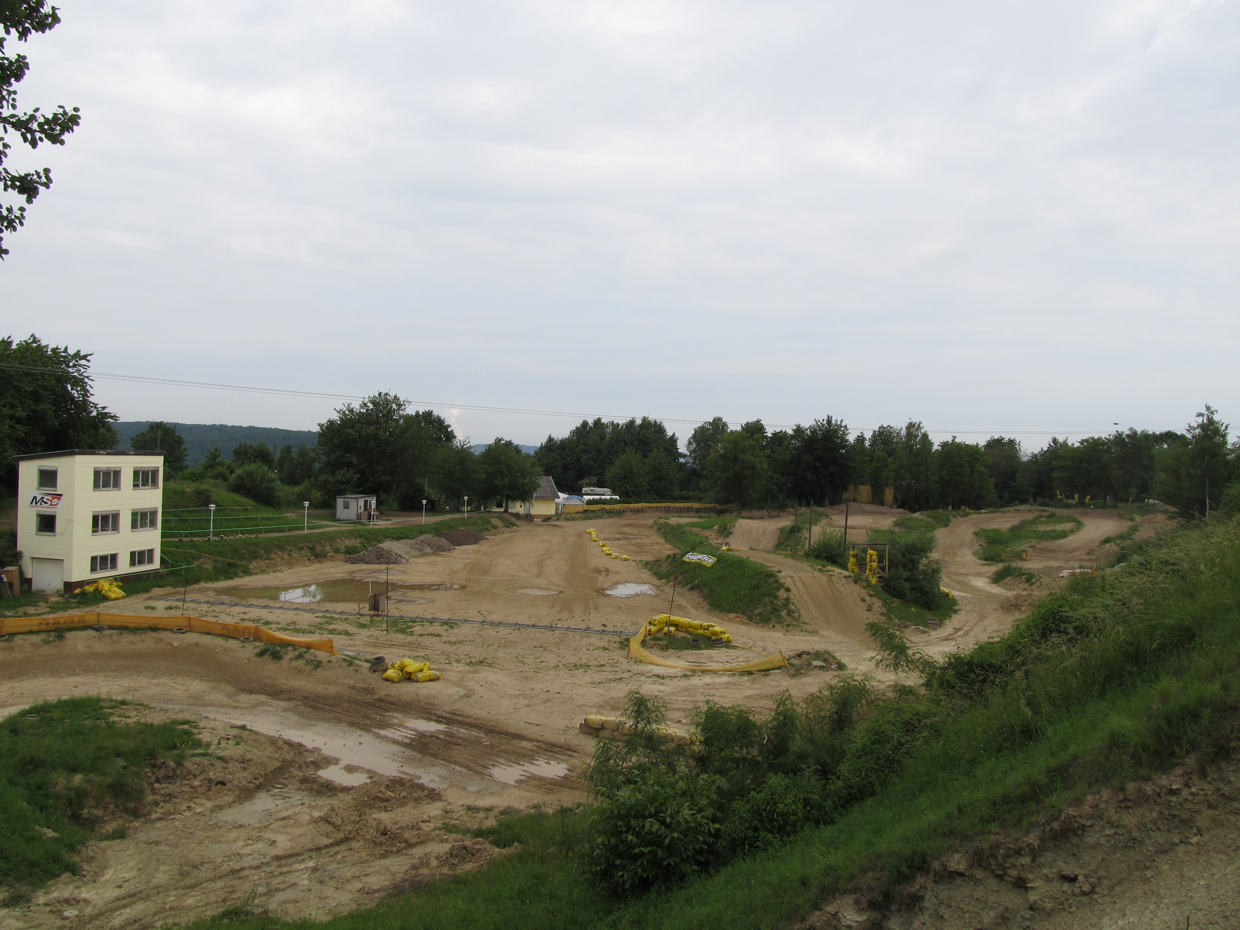 Die Lettkaul bei Niederwürzbach, Saarland